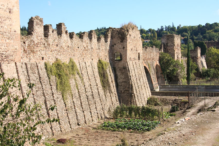 Ponte Visconteo di Valeggio sul Mincio, vista laterale